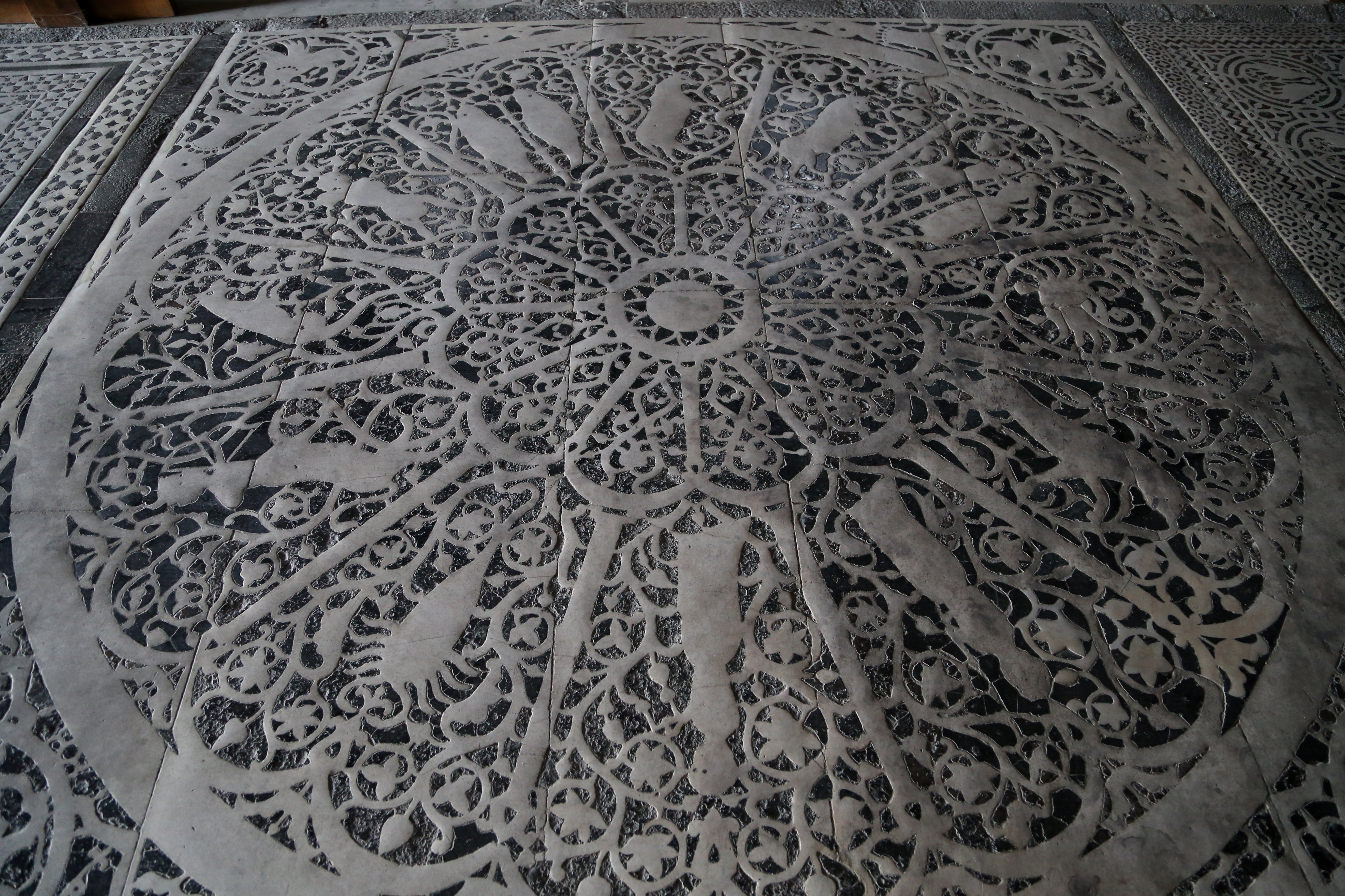 Fußboden, San Miniato al Monte, Florenz